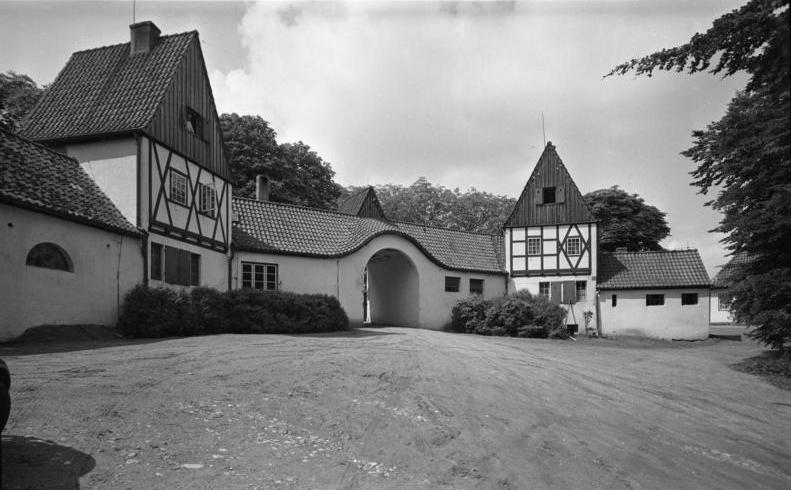 Jugendwerk Schleswig-Holstein Koppelsberg bei Plön Torhaus 23. Juni - 28. Juni 1958